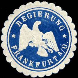 Sealing stamp Title: Regierung-Frankfurt an der Oder Description: blau, weiß, geprägt Place: Frankfurt / Oder size: 4 cm